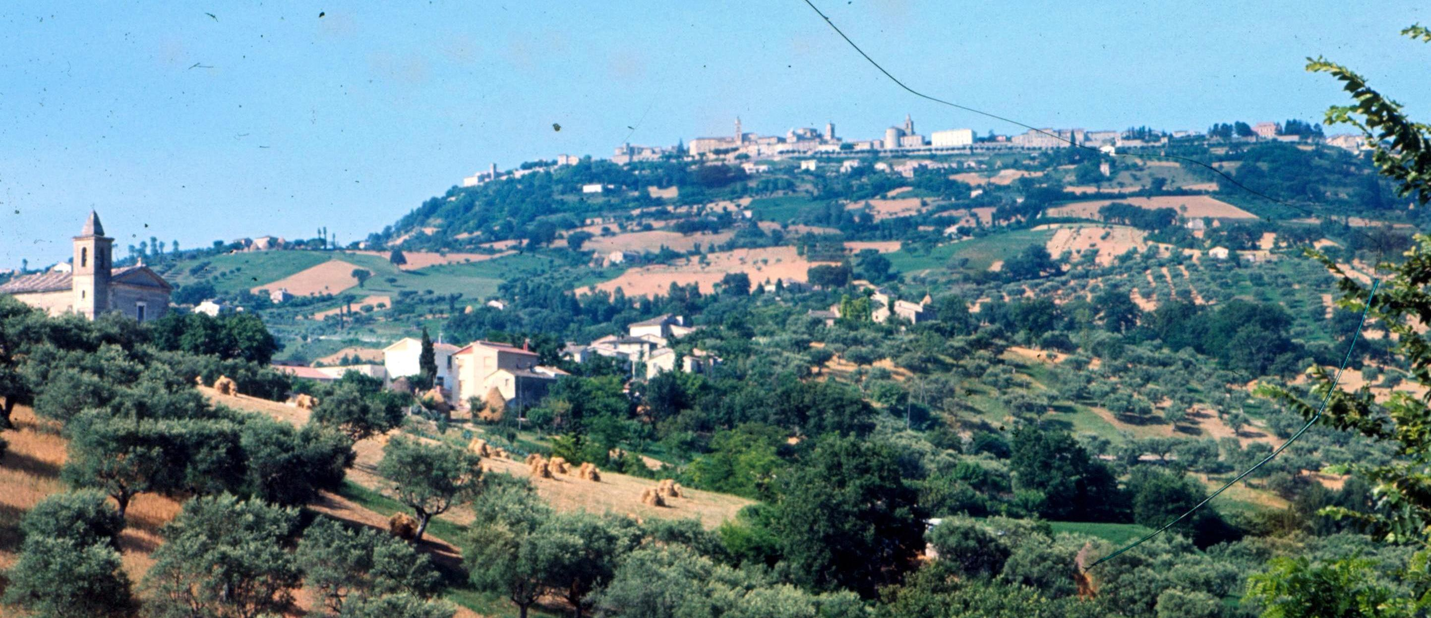 Celso Mosca, Cingoli panorama